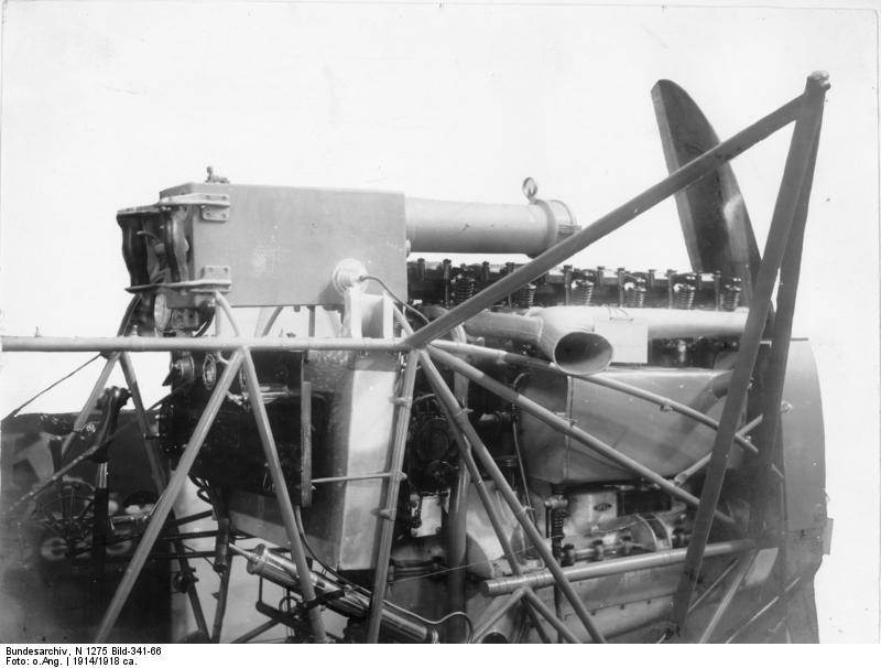 Maschinengewehr Kamera [Stempel: N.V. Techn. Maatsch "Aerofoto" Singel 238, Amsterdam]